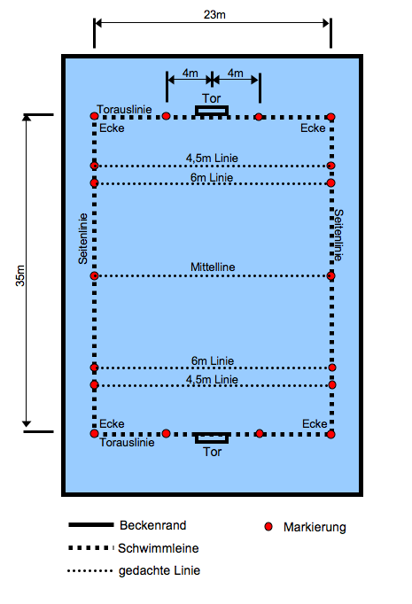 Kanupolo Spielfeld